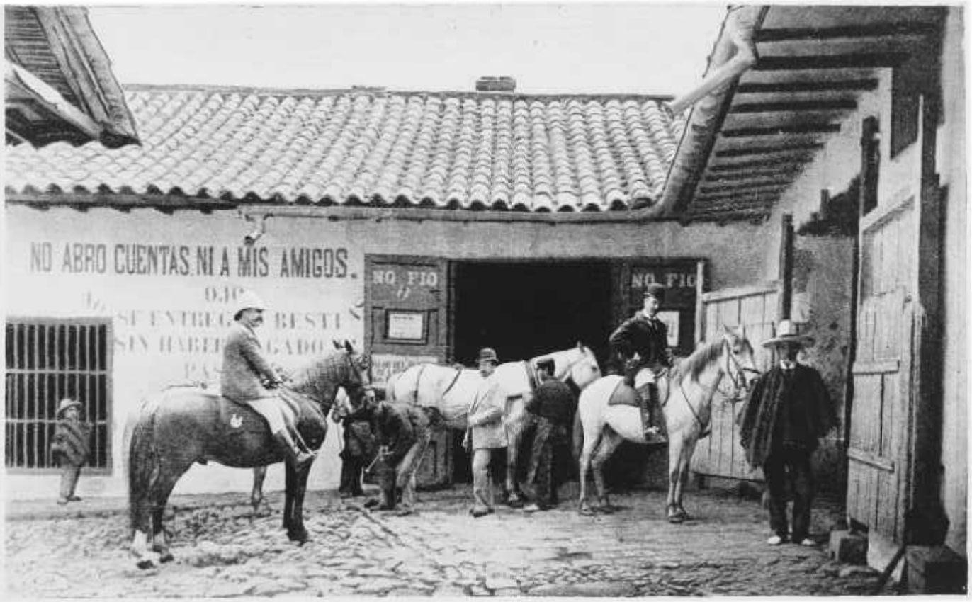 Bogota, stop for drink, 1893